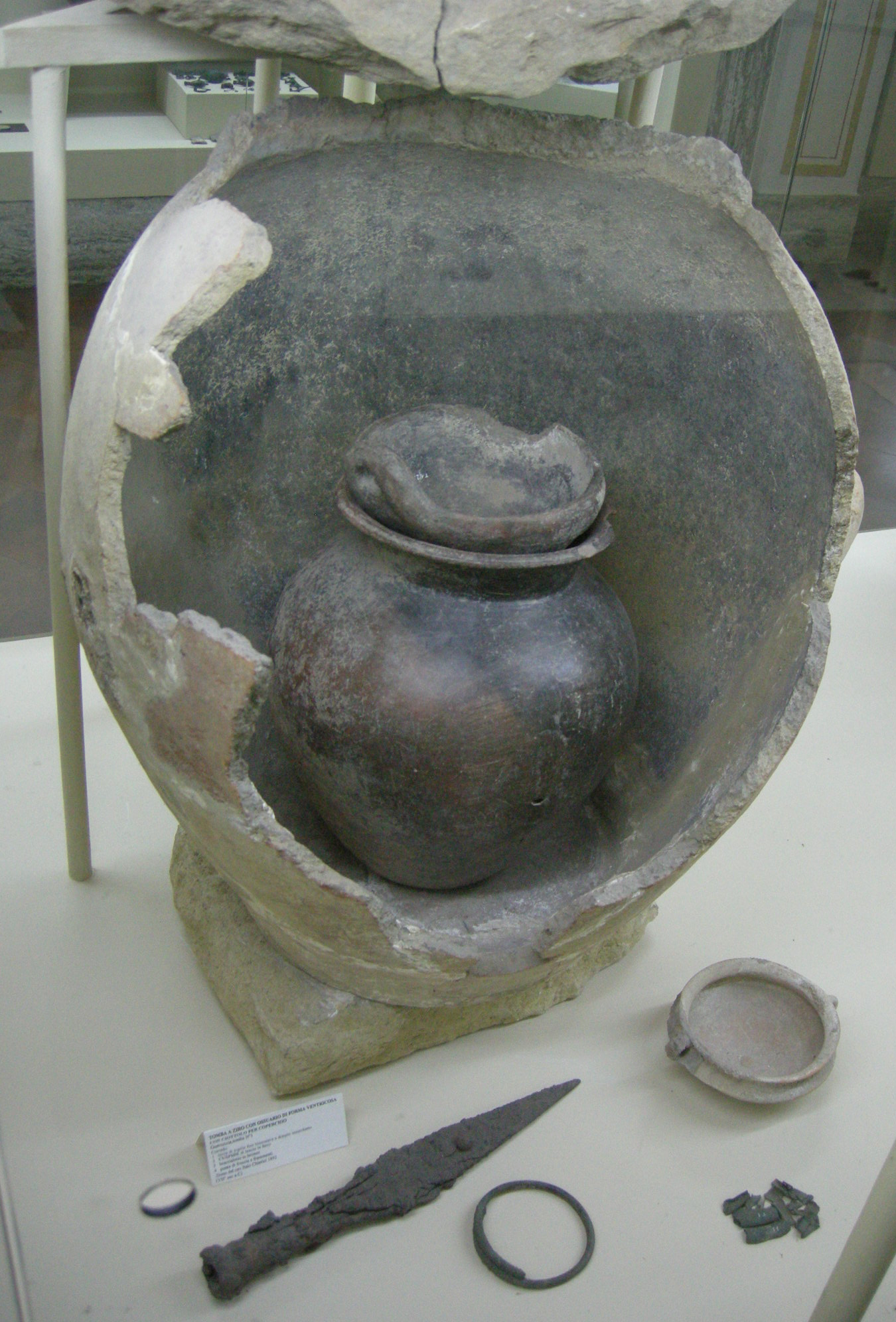 Museo guarnacci, urne cinerarie villanoviane